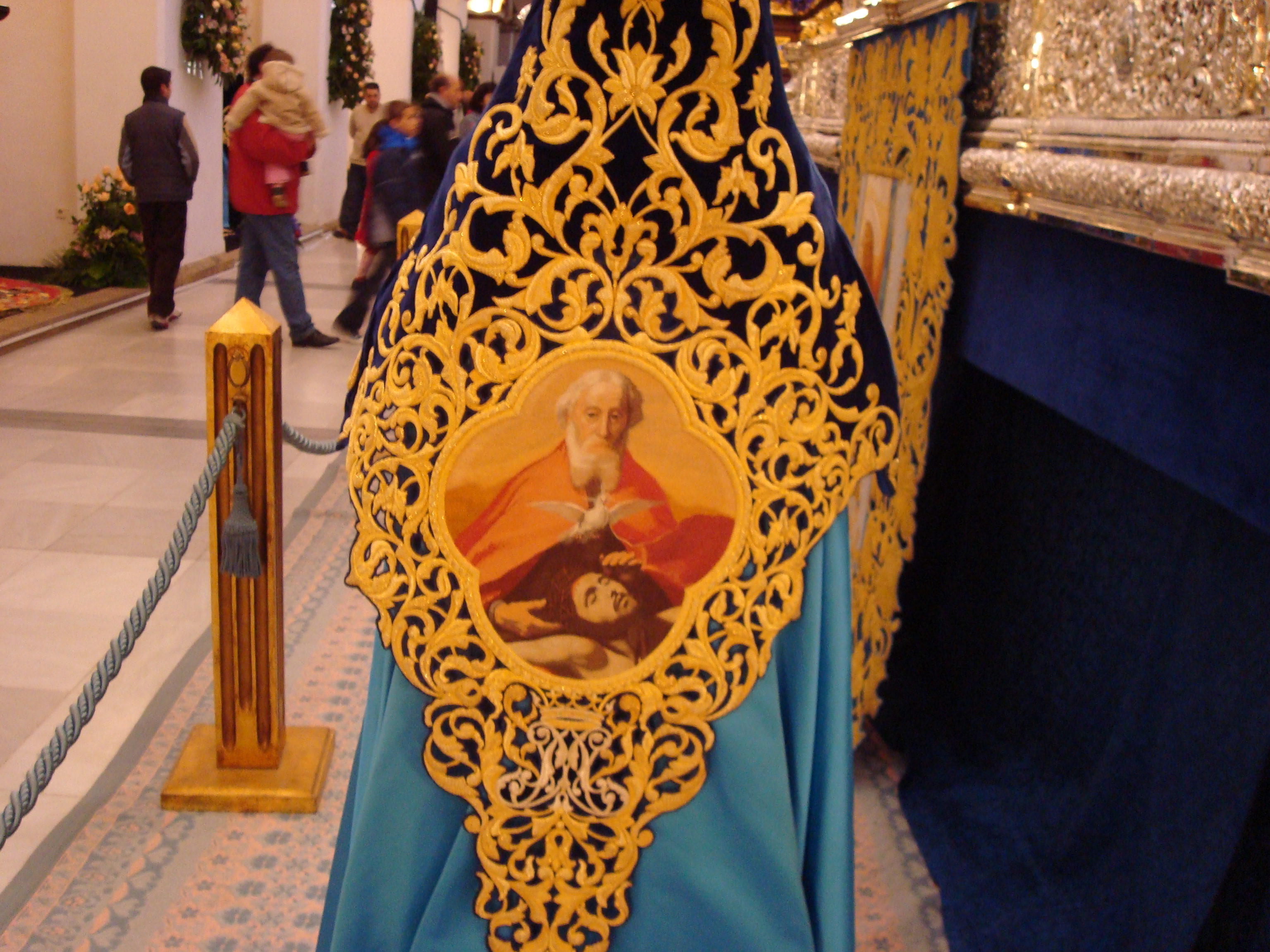 Nazareno de la Virgen de los Dolores, Semana Santa Lorca